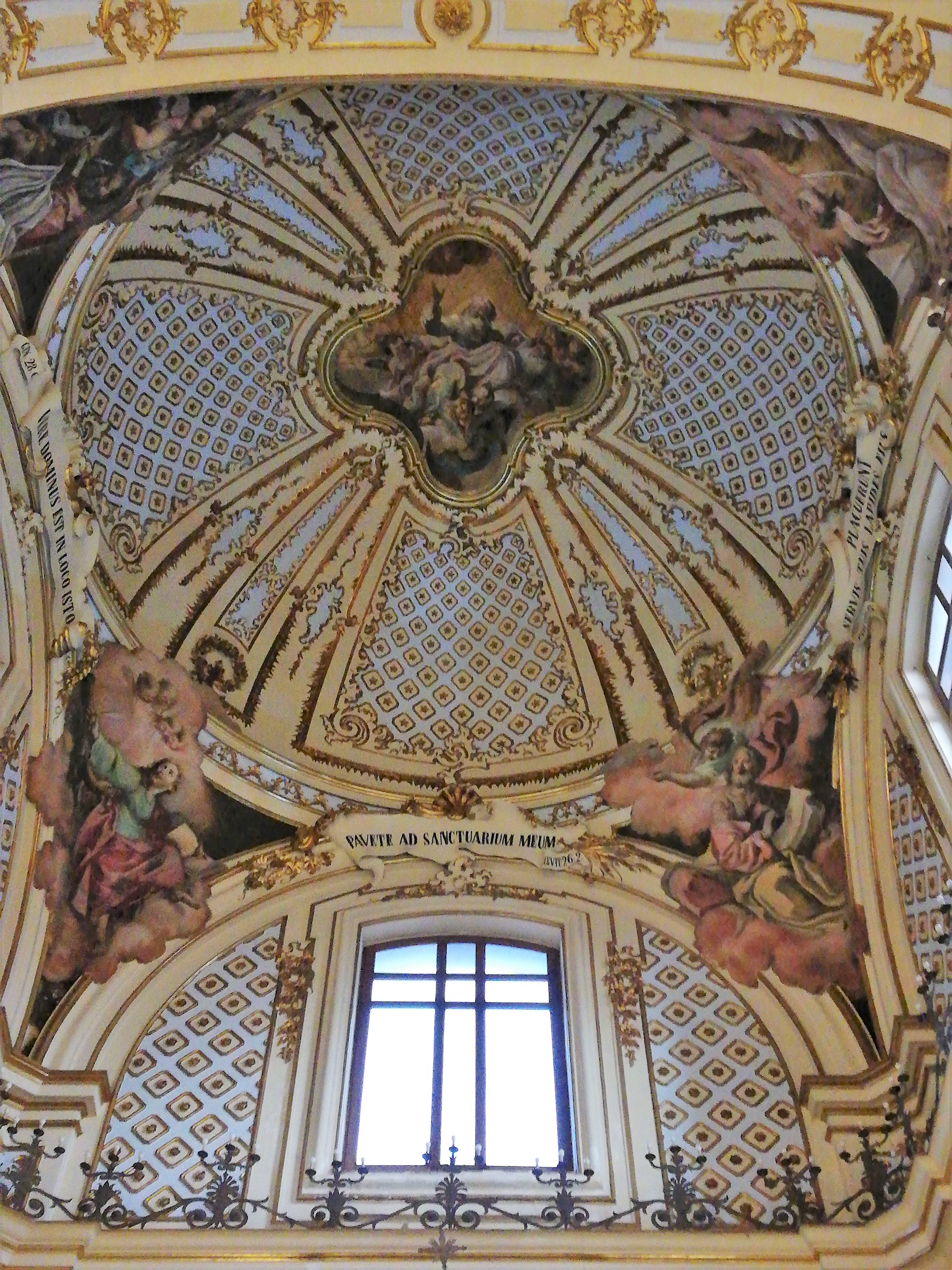 Volta presbiterio.